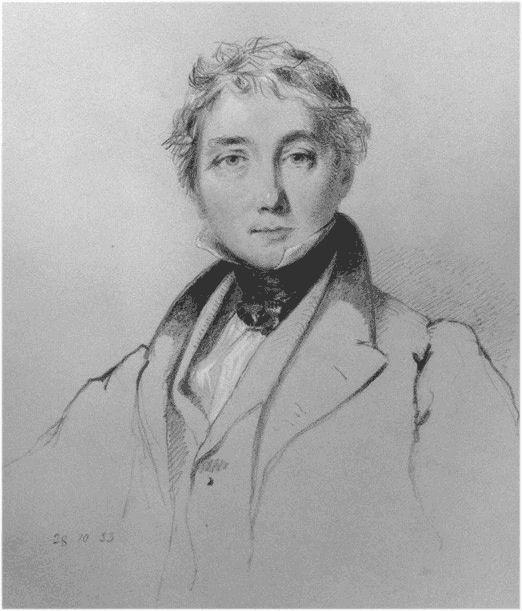 James Baillie Fraser (1783 – 1856)